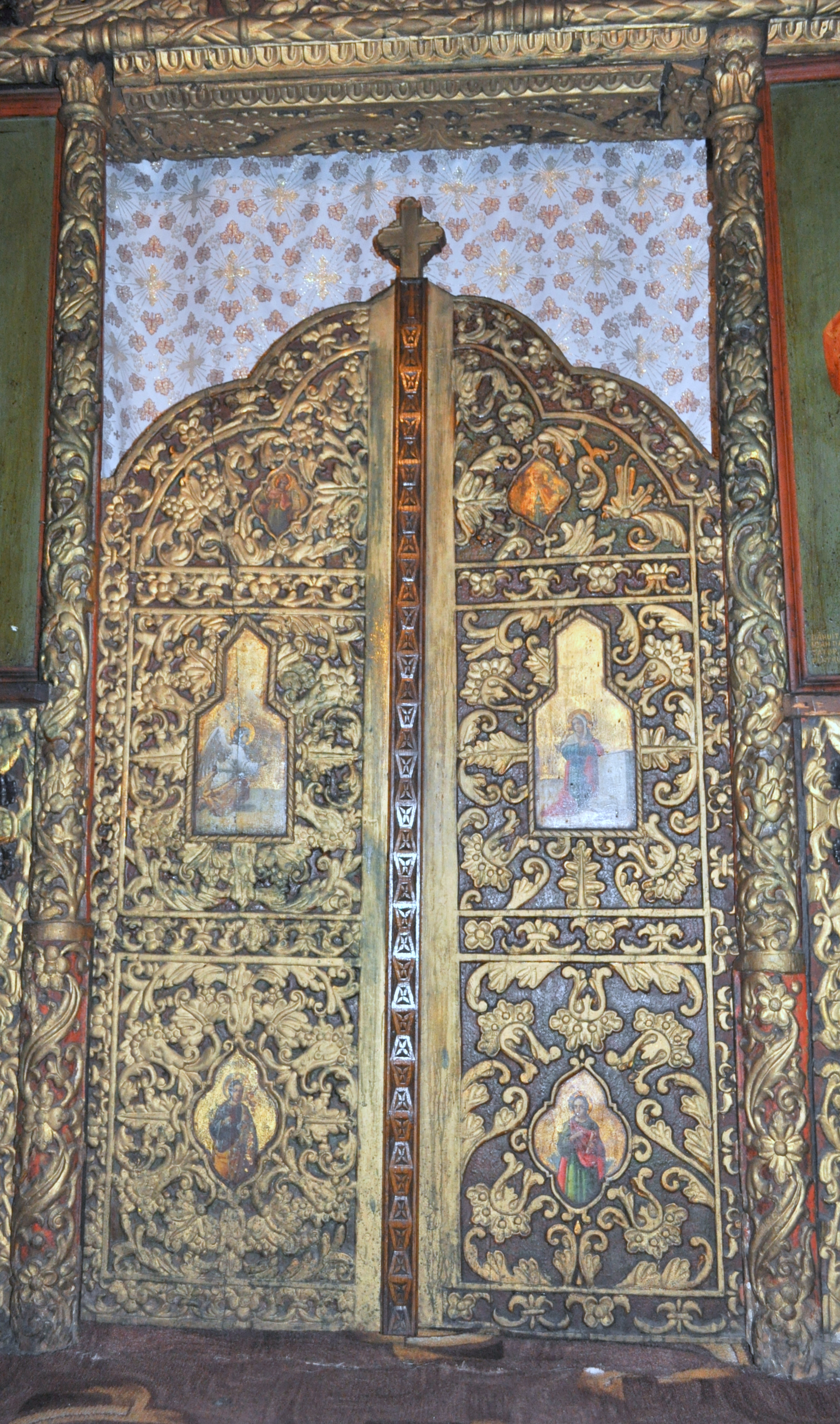 Ansamblul schitului Crasna, județul Gorj